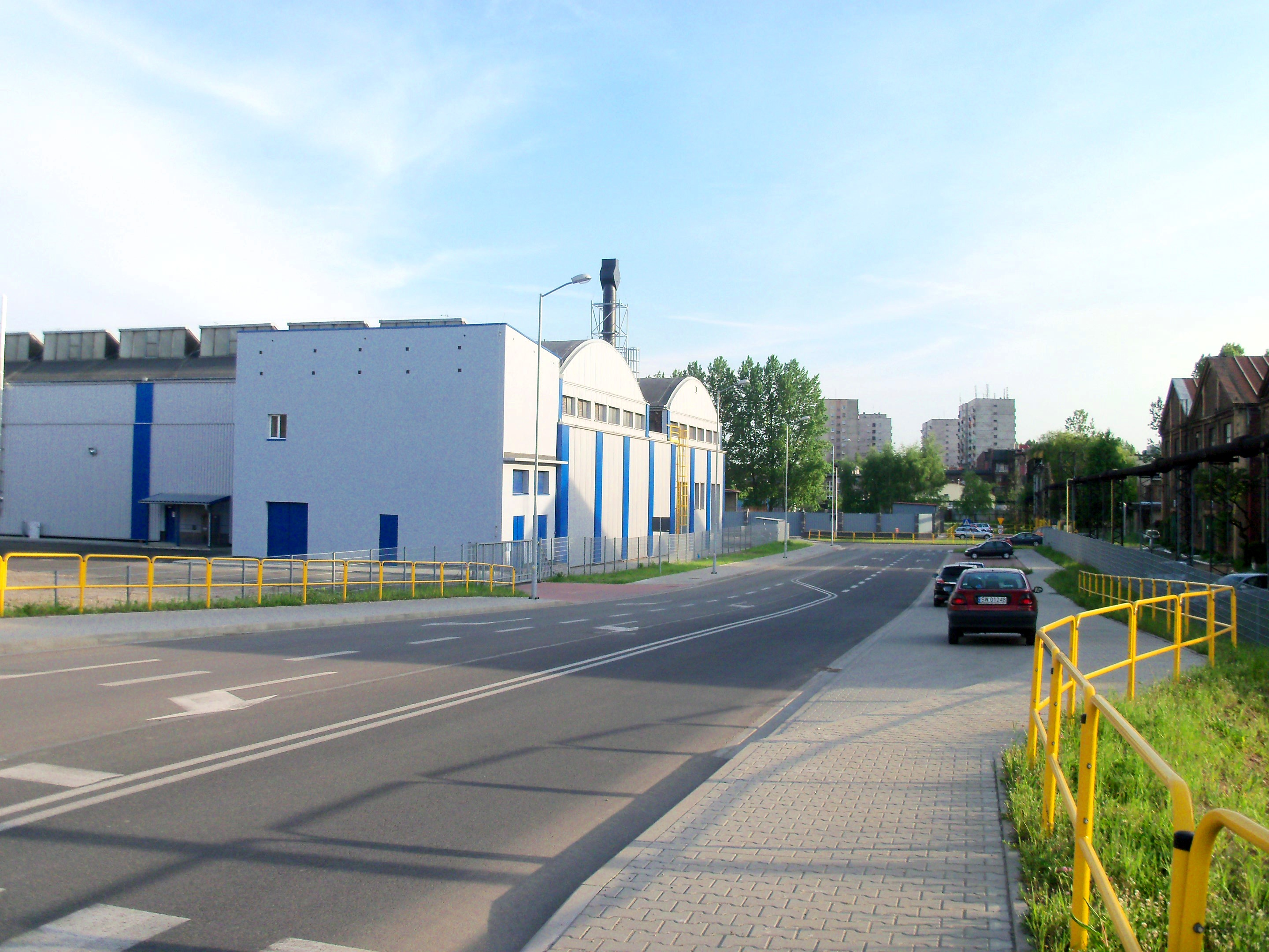 Ulica Johna Baildona w Katowicach - tereny Huty Baildon